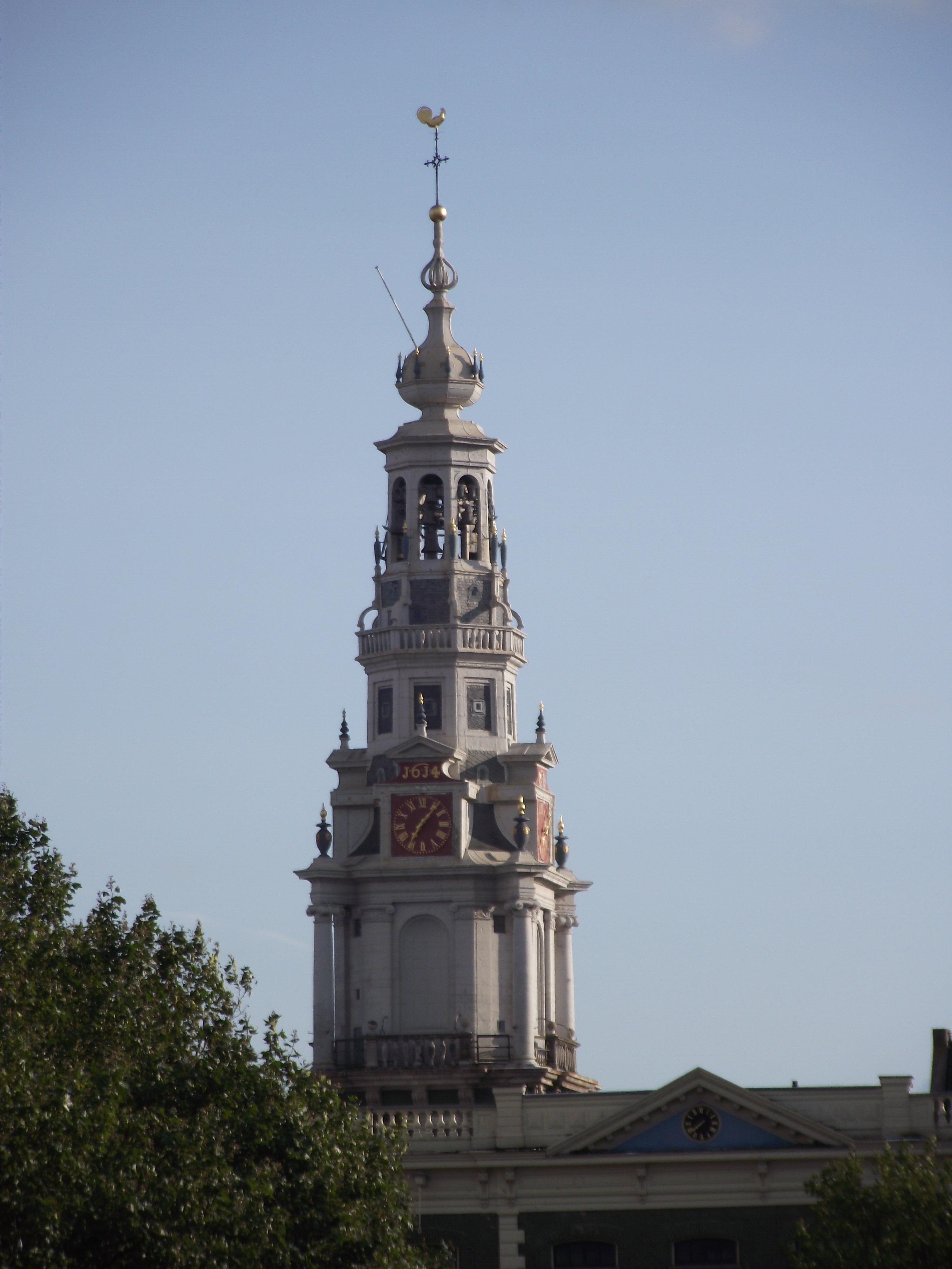 Amsterdam, Zuiderkerk, H.de Keyser, 1611-14